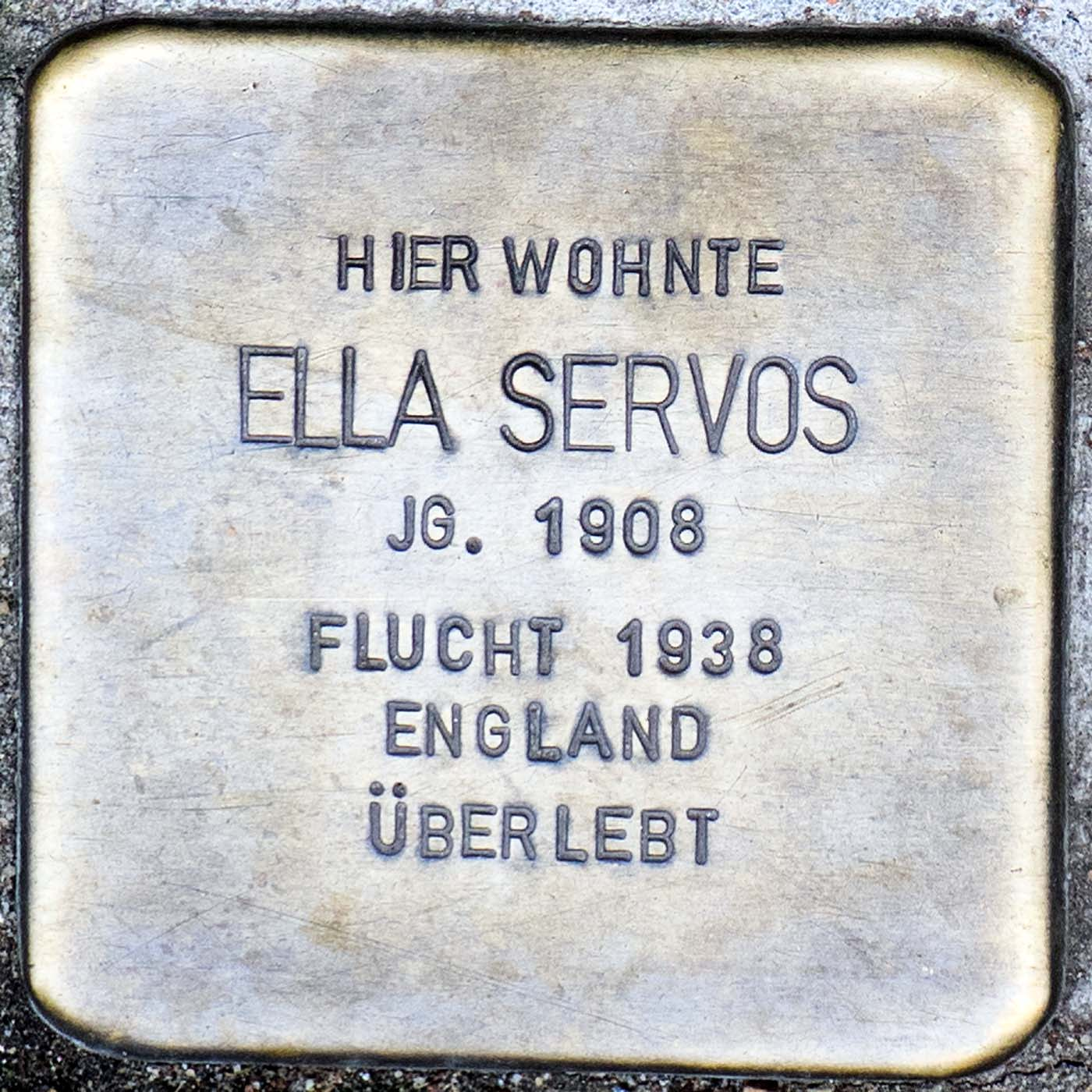 Stolperstein für Ella Servos (Willich)